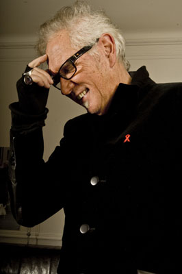 Eric Charden Eric Charden